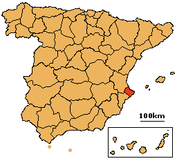 Modificación del mapa "Map_Spain_1822_.png" con colores iguales para todas las provincias y provincia de Játiva resaltada.